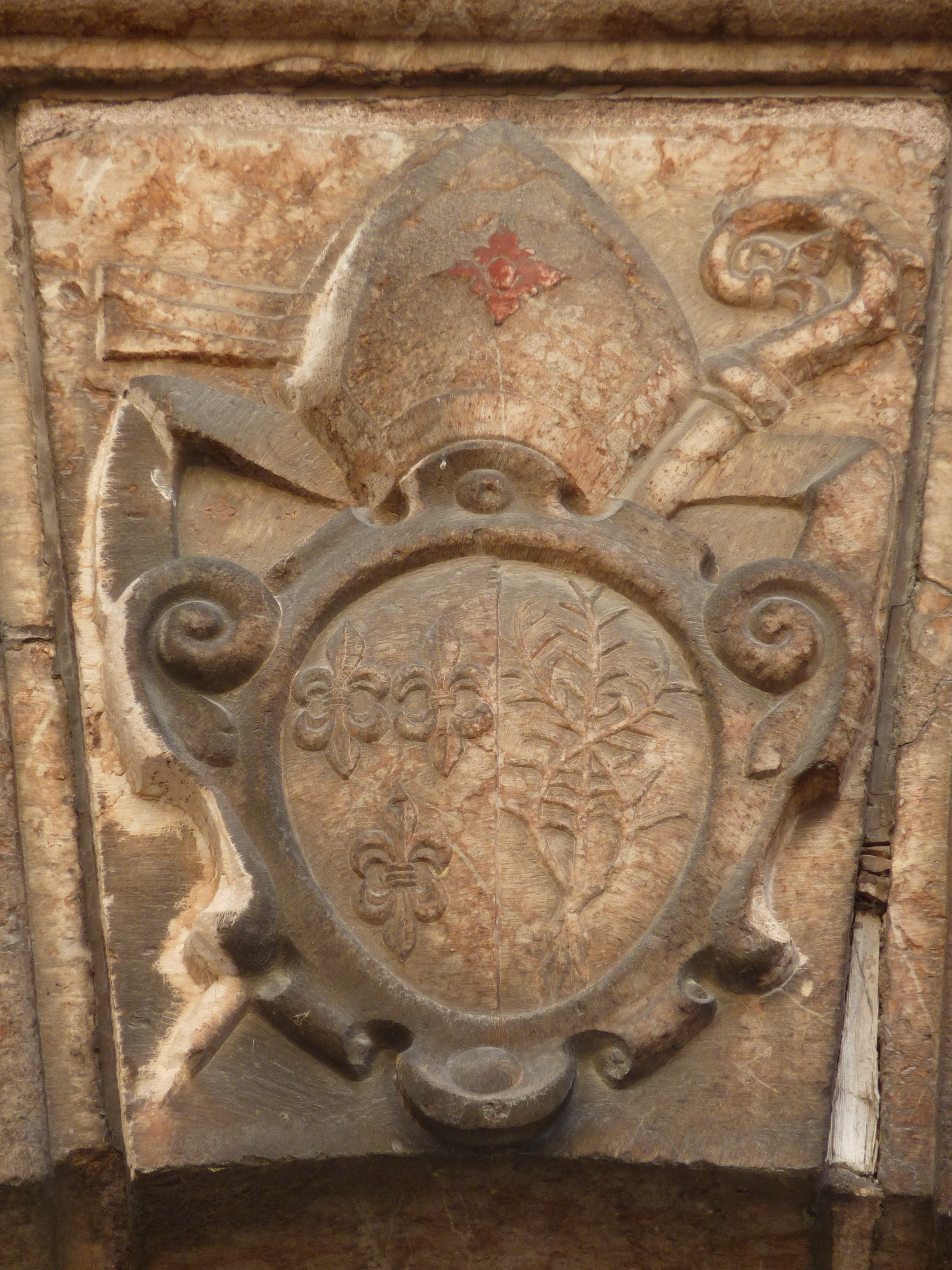 Stift Lilienfeld, Niederösterreich - Wappen von Abt Cornelius Strauch auf dem Scheitelstein des Westportals des Kirchhofes